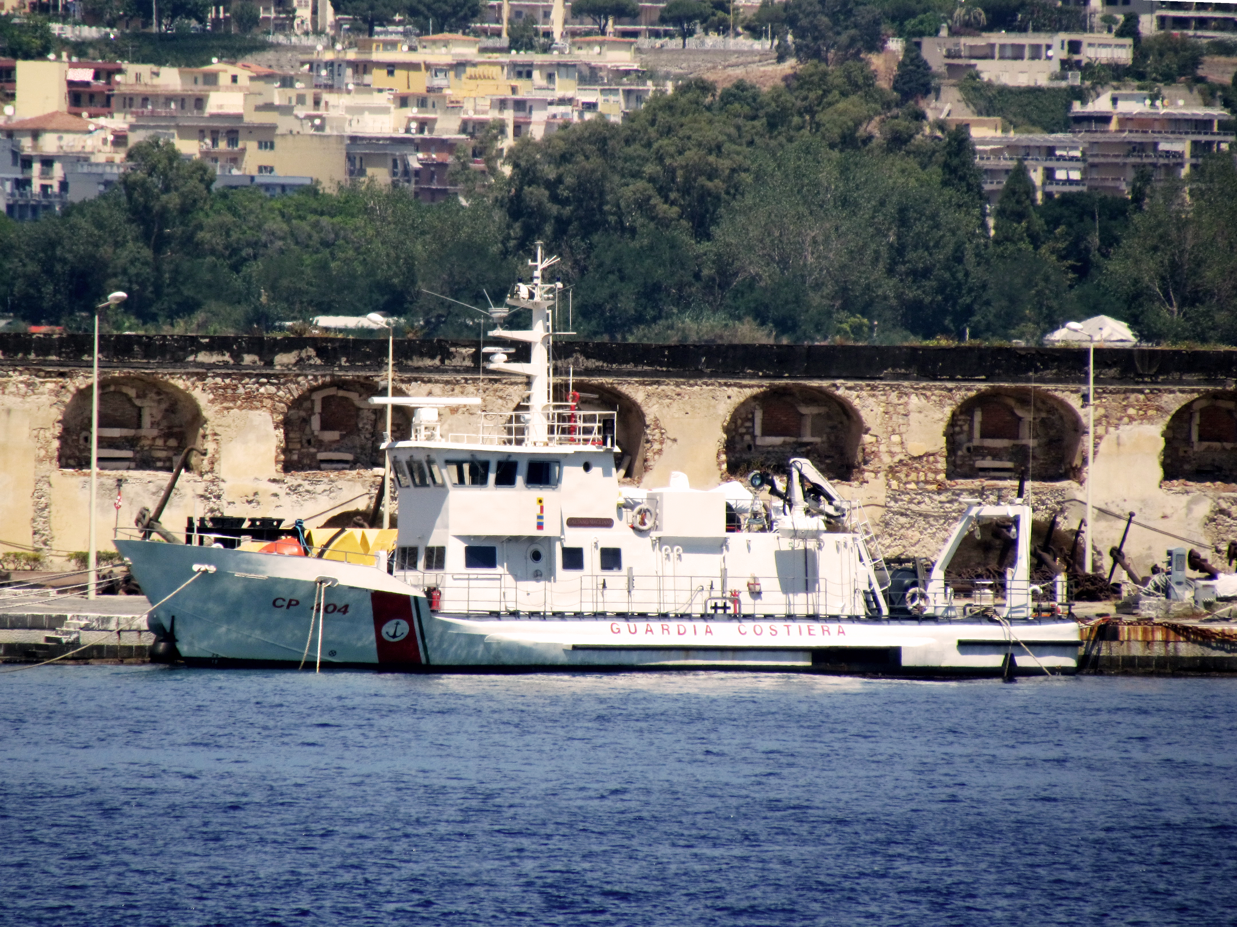 Il pattugliatore della Guardia Costiera CP 404 Gaetano Magliano ormeggiato a Messina